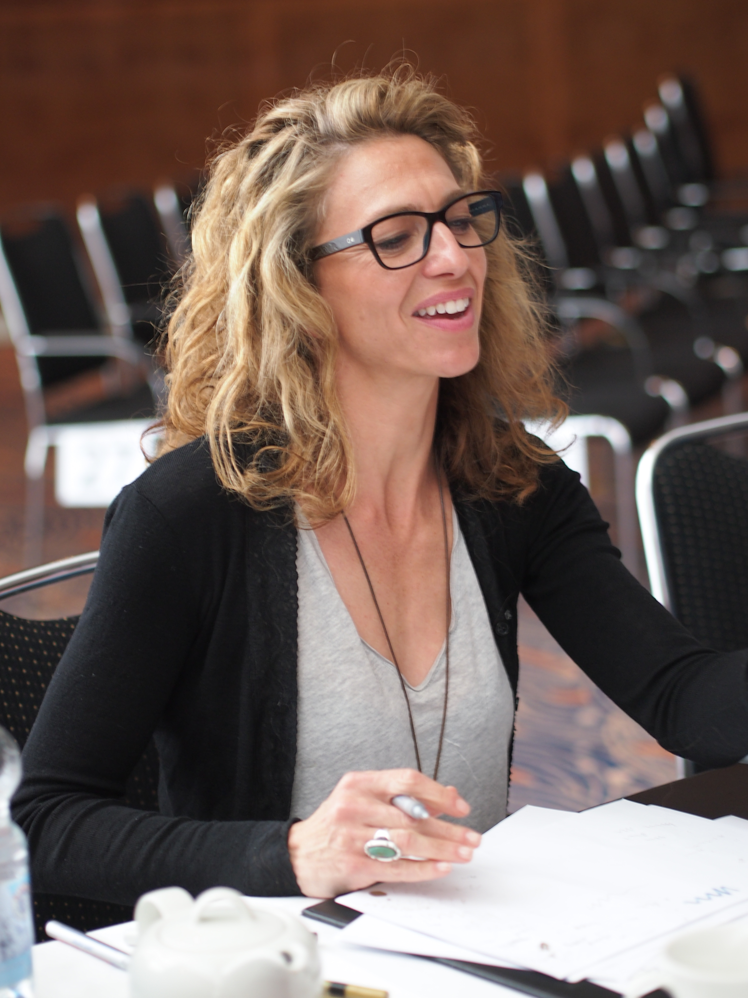 Claudia Black